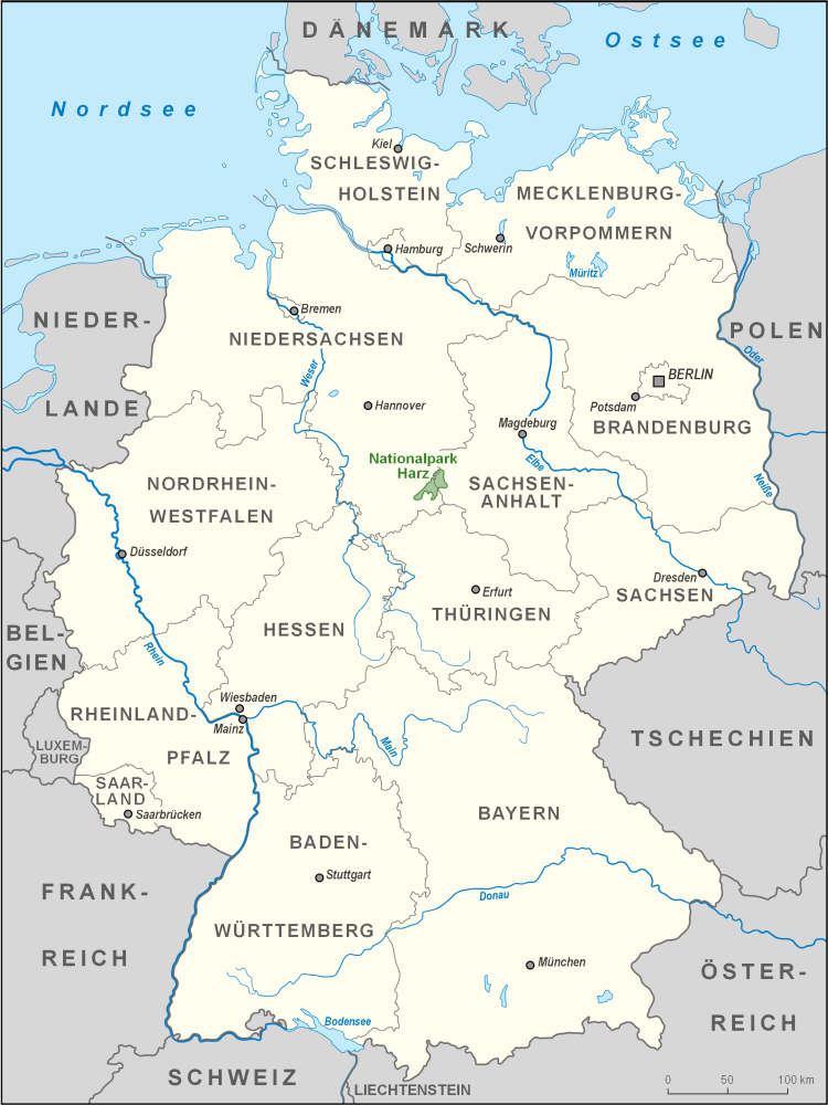 Karte des Nationalparks Harz in Deutschland